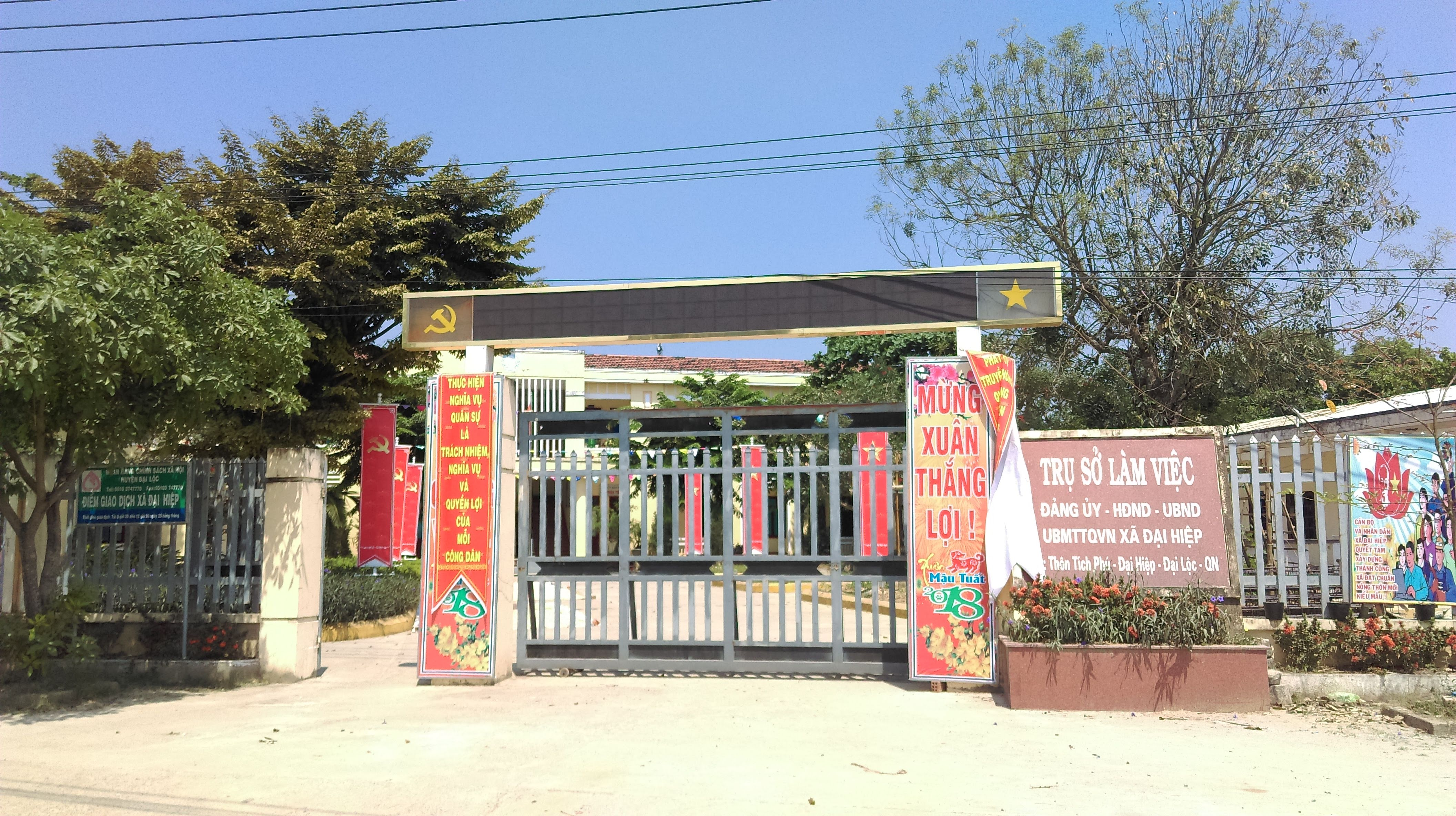 UBND xã Đại Hiệp, Đại Lộc, Quảng Nam